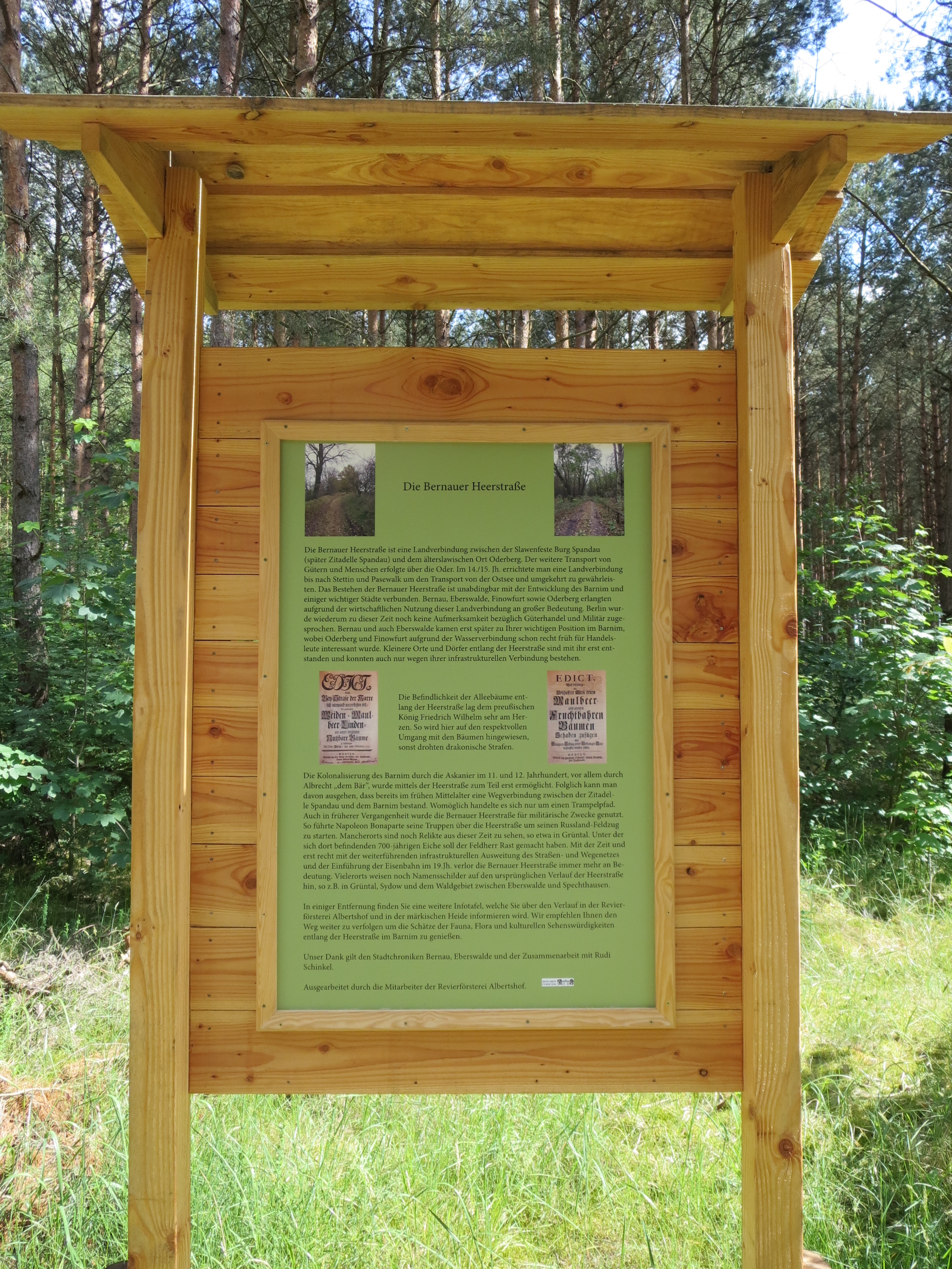 Infotafel zur Bernauer Heerstraße an der Wegkreuzung östlich der Krähenberge